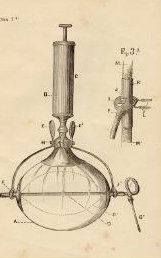 Aparell per a fer transfusions sanguínies ideat per Ramon Coll i Pujol (Barcelona, 28 de gener de 1845 — 22 d'agost de 1915), catedràtic de Fisiologia de la Universitat de Barcelona.